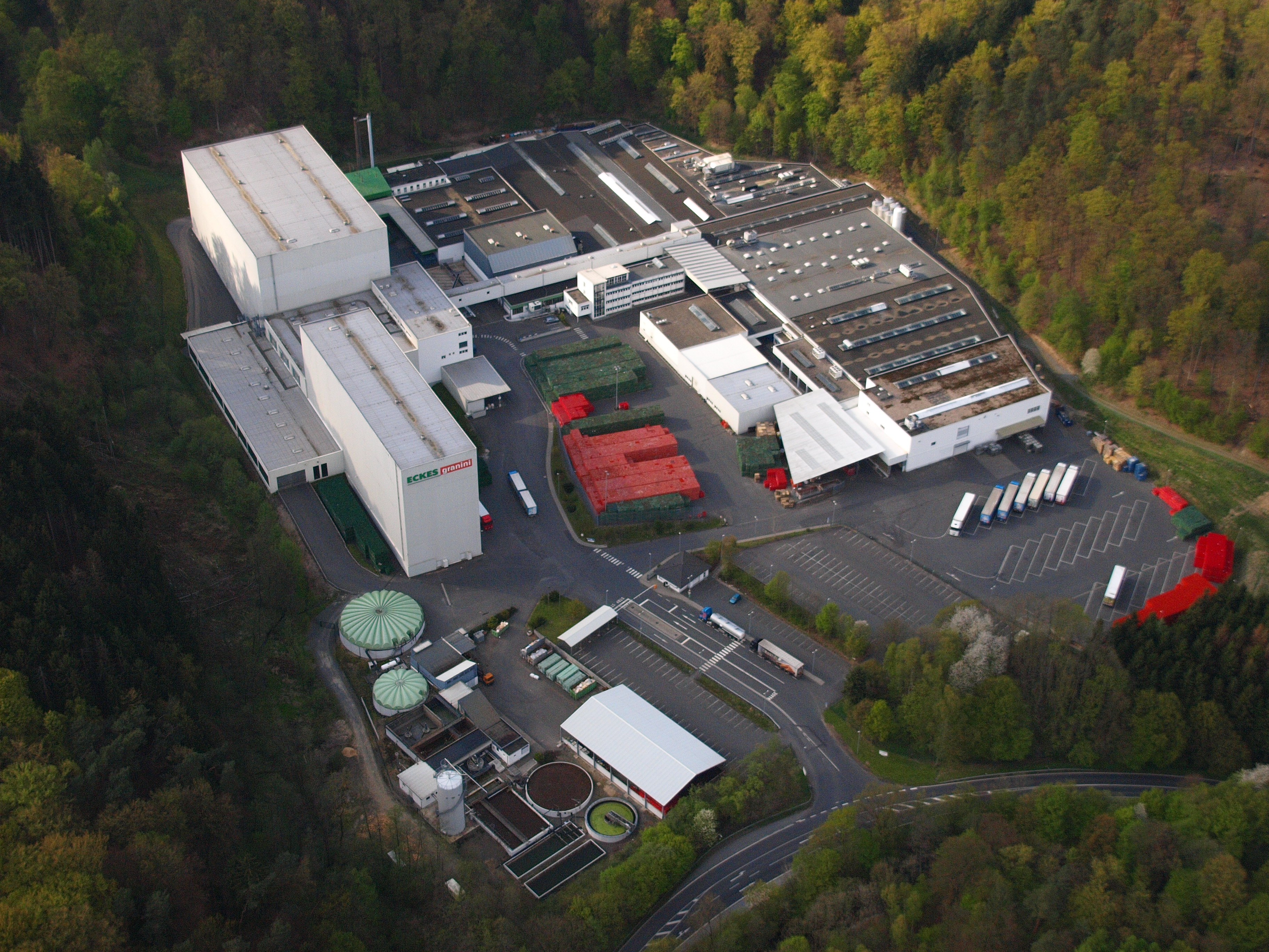 Eckes-Werk im Bröltal bei Winterscheid: Luftaufnahme